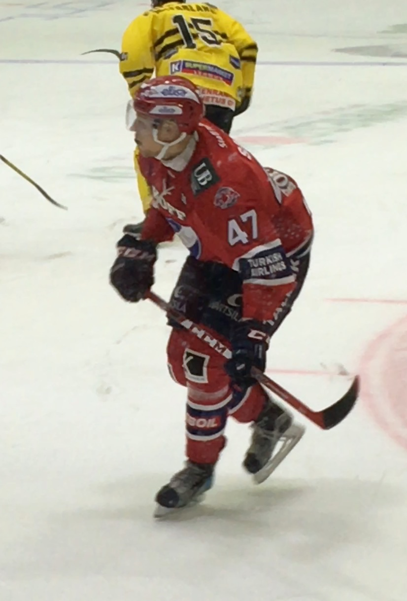 Jääkiekkoilija Juuso Salmi edustamassa Helsingin IFK:ta 13. lokakuuta 2016 ottelussa HIFK–SaiPa.